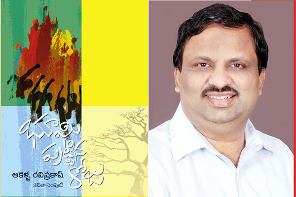 ఆకెళ్ళ రవిప్రకాష్